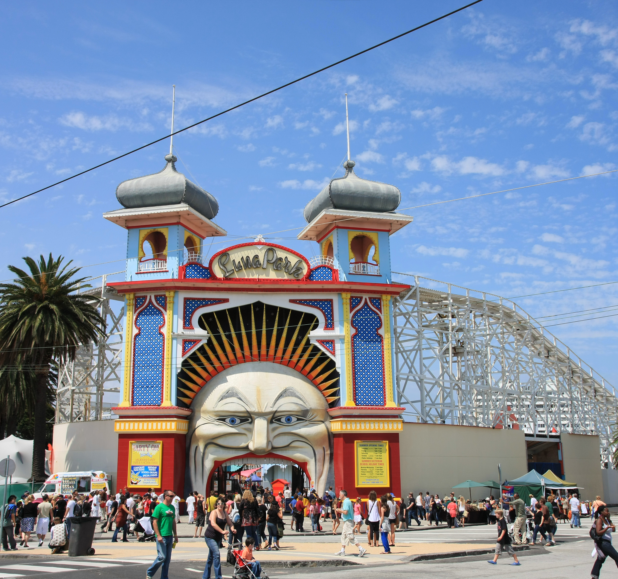 Luna Park in Melbourne